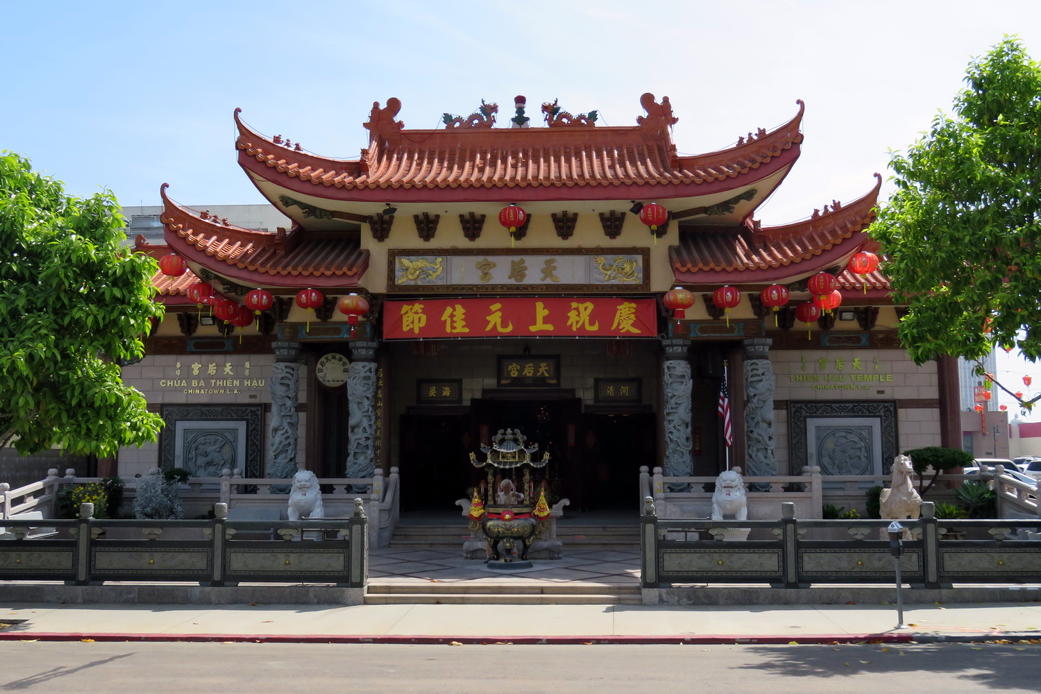 Los Angeles, Buddhist Temple Thien Hau, 2016.03.27 (03)